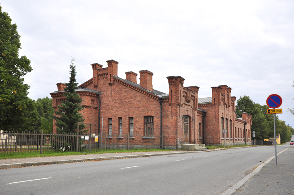 Upseerikerho, rakennus nro. 5 Vuorikadun varrella